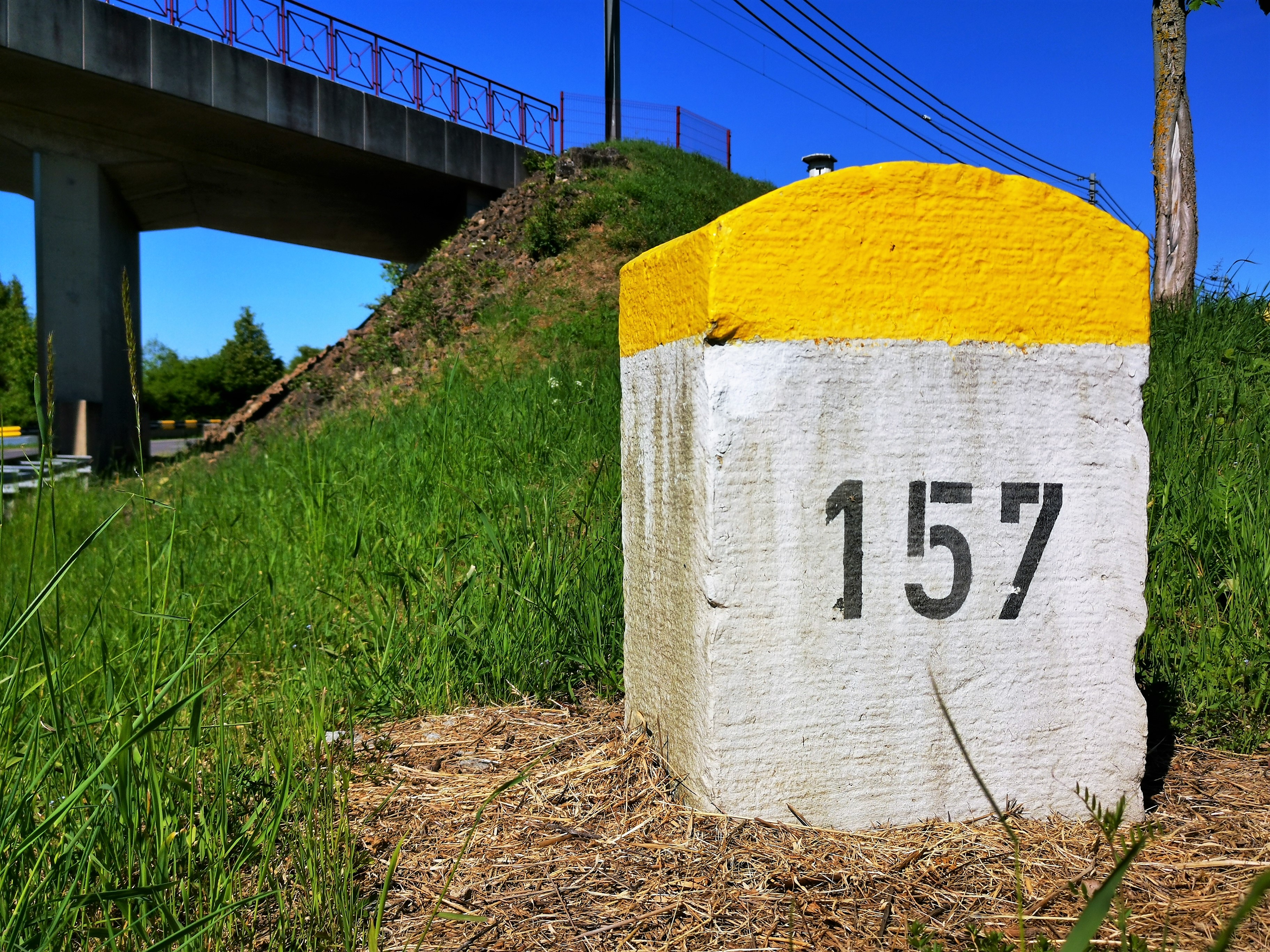 Borne kilométrique CR157 entre Alzingen et Roeser.